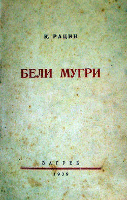 Корица на „Бели мугри“, Коста Солев Рацин.